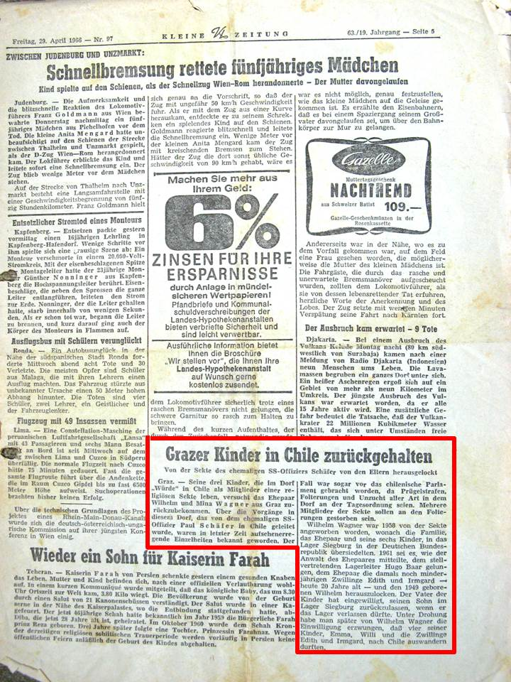 Auch österreichische Familien waren in der Colonia Dignidad